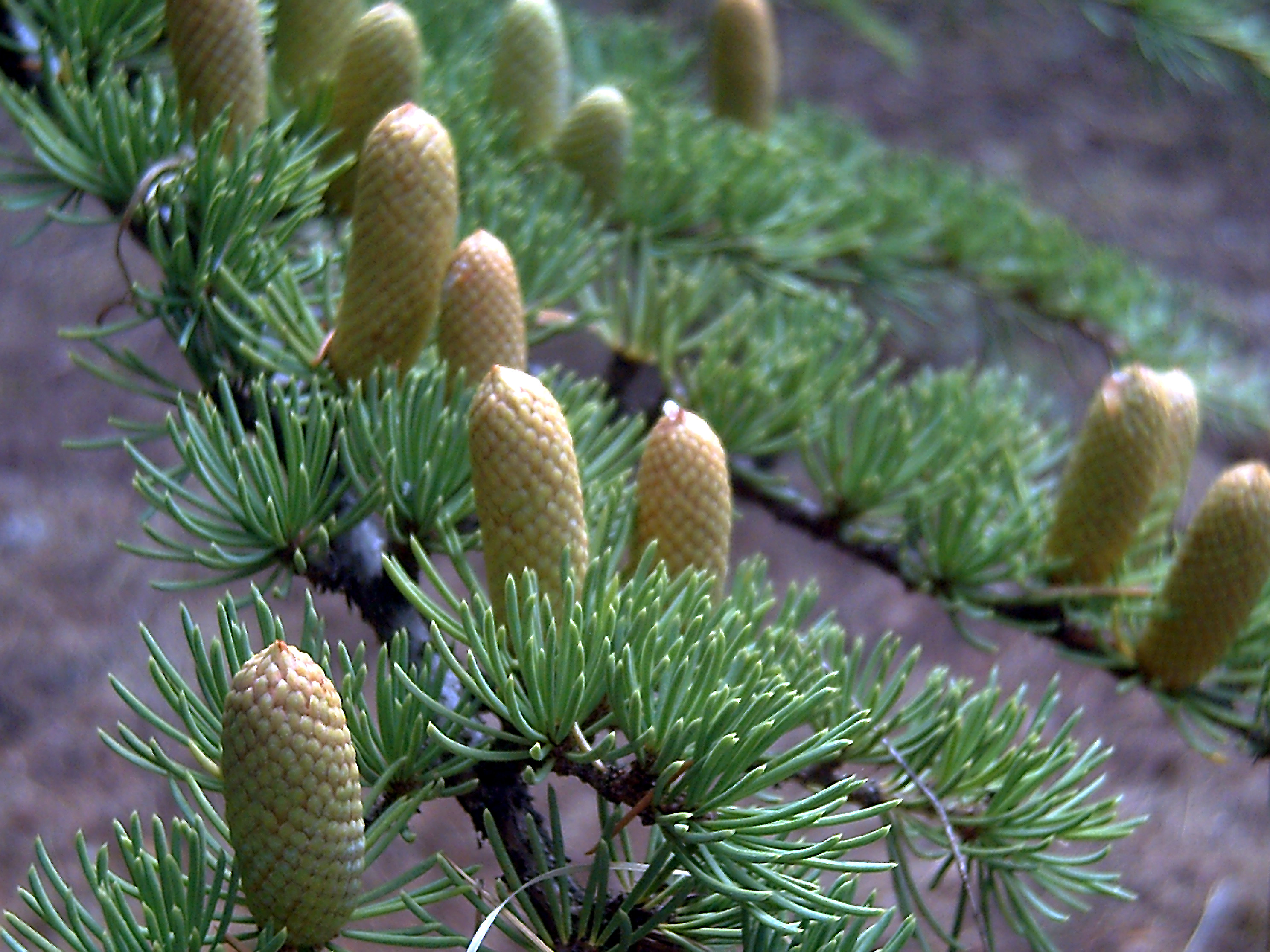 Cedrus libani var. atlantica (Atlas Cedar) male cones in Arboretum La Alfaguara